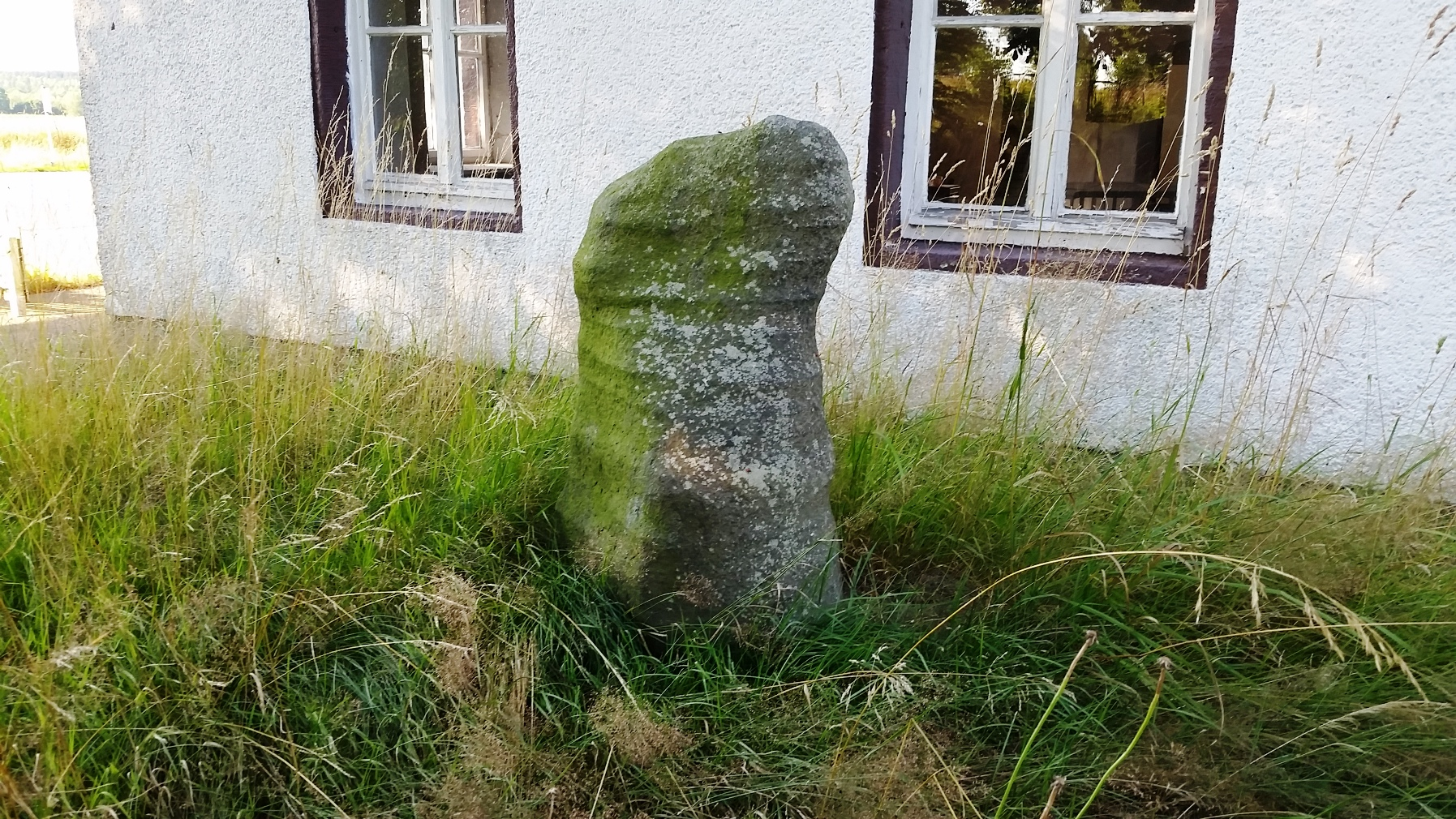 Findling am Westgiebel des ehemaligen Gasthauses Dürrer Fuchs